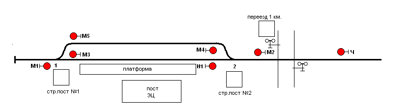 Система ЭЦ СТ. Юность ММЖД